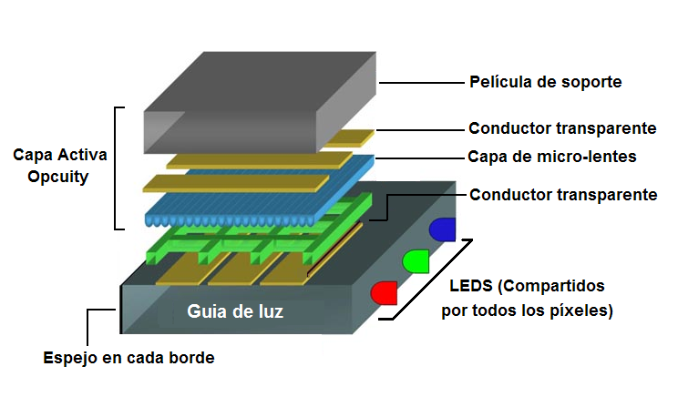 Estructura de capas de TMOS. Modificación de imagen.